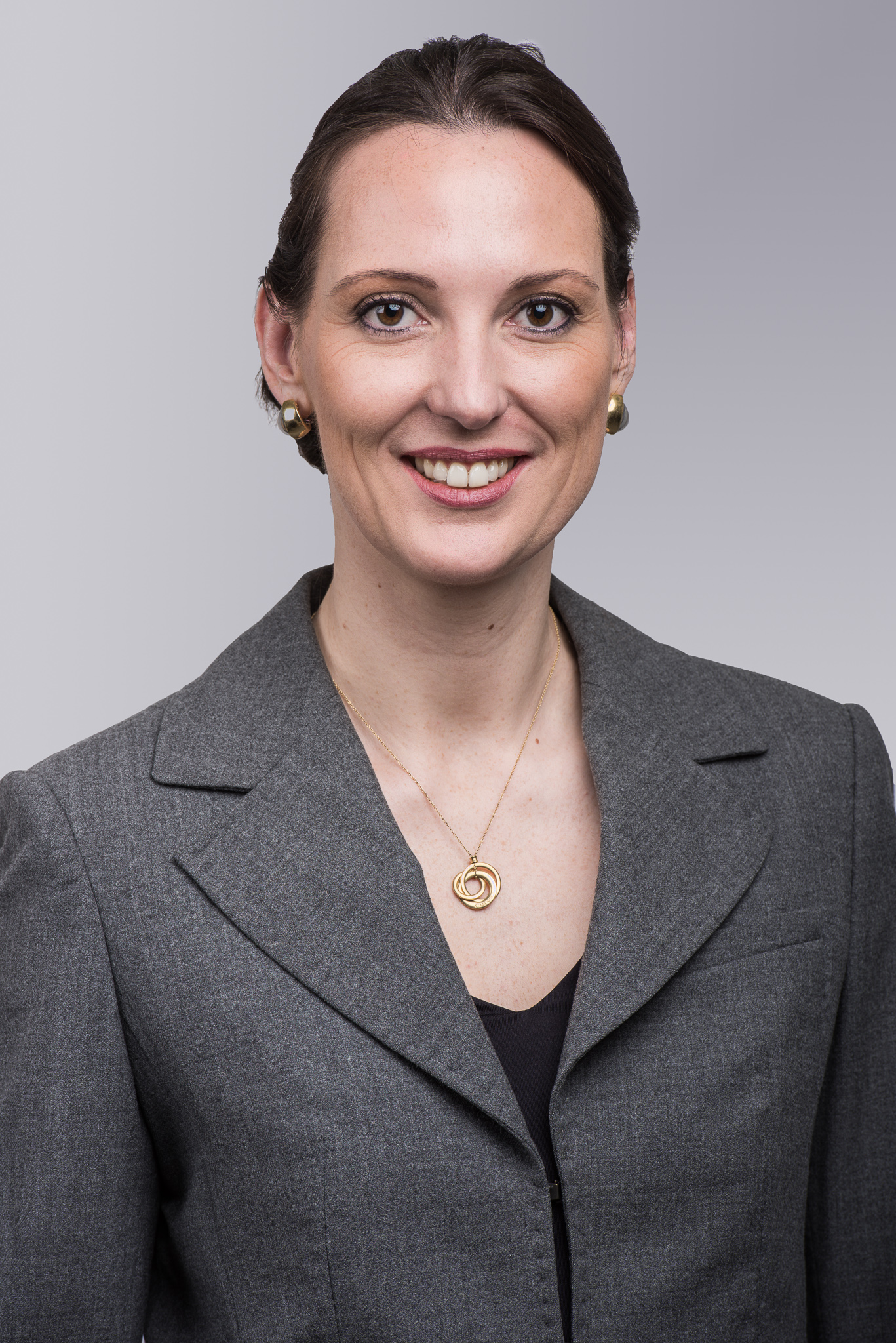 Bundesagentur für Arbeit,Valerie Holsboer,Vorstand